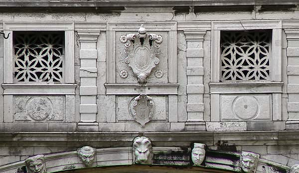 Détail du Pont des Soupirs.